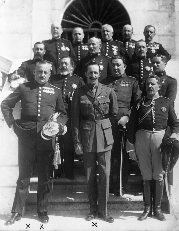 Der Ex-Diktator Spaniens, Primo de Revera gestorben ! Aufnahmen aus der Glanzzeit seiner Diktatur. Der spanische Ex-Diktator Primo de Revera und der spanische König Alfons im Kreise ihrer Offiziere.